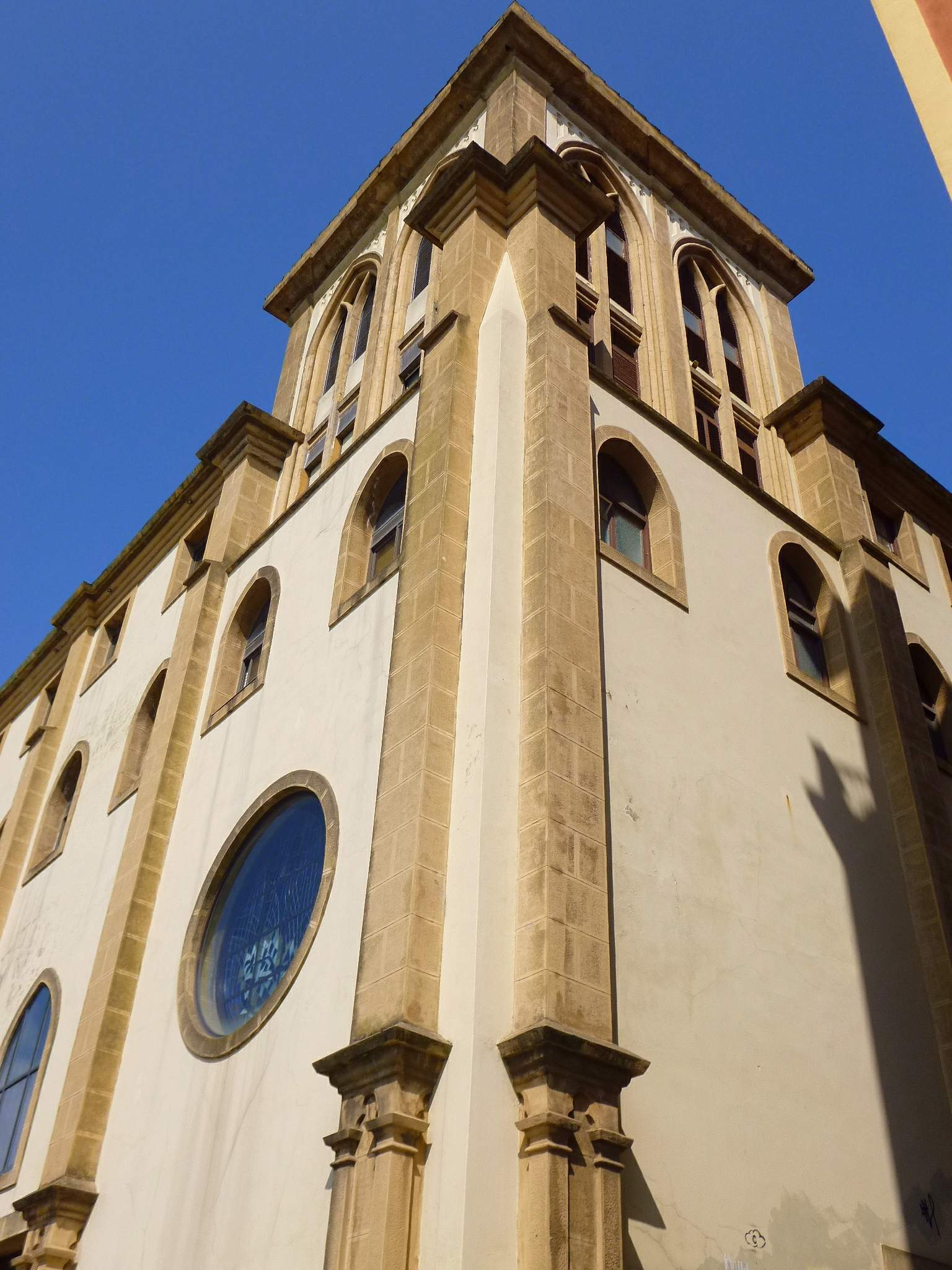 Franciscanos de Atotxa, en Donostia-San Sebastián